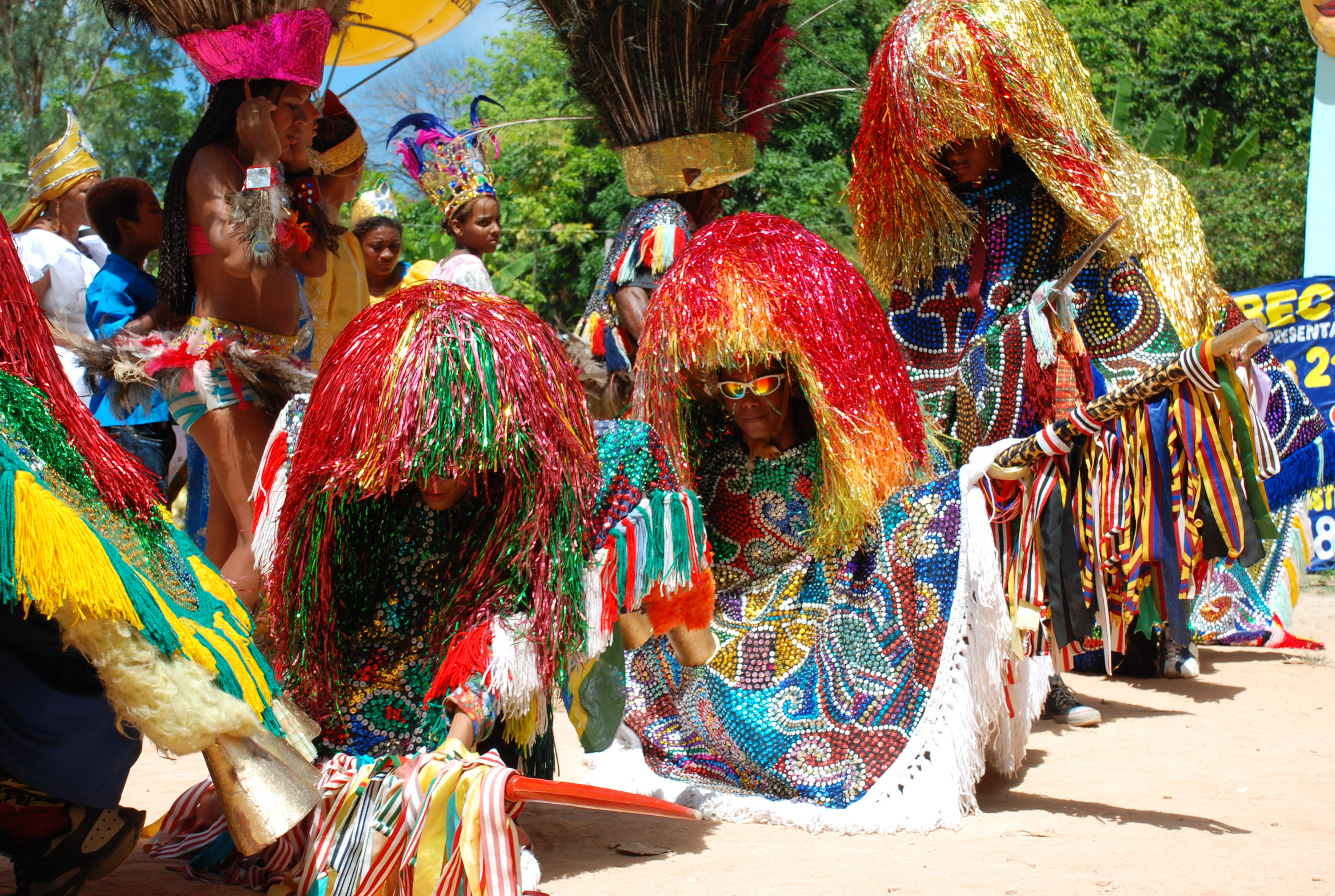 Caboclos de lança em evolução.